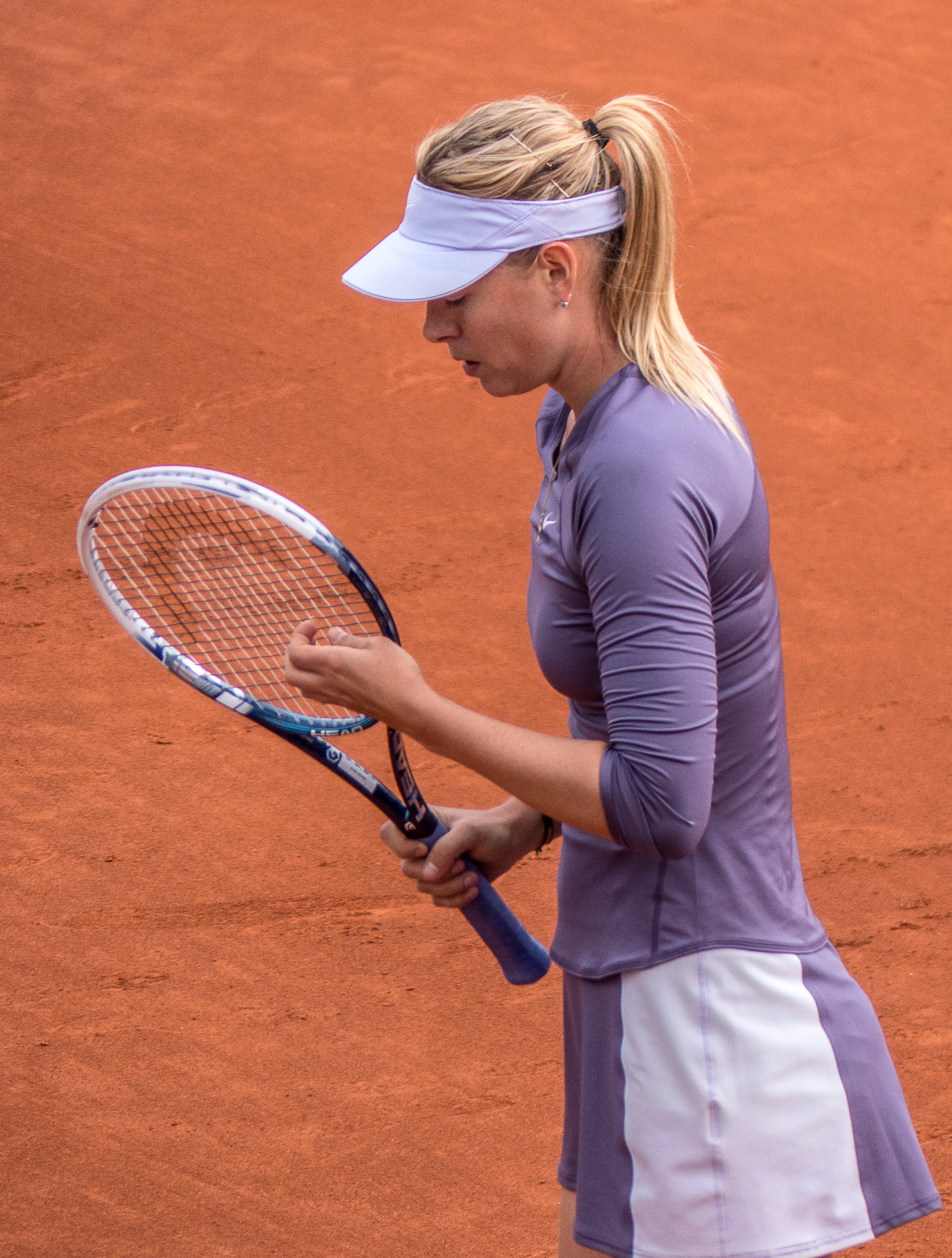 2ème tour Roland Garros 2013 : Maria Sharapova (RUS) vs Eugenie Bouchard (CAN)